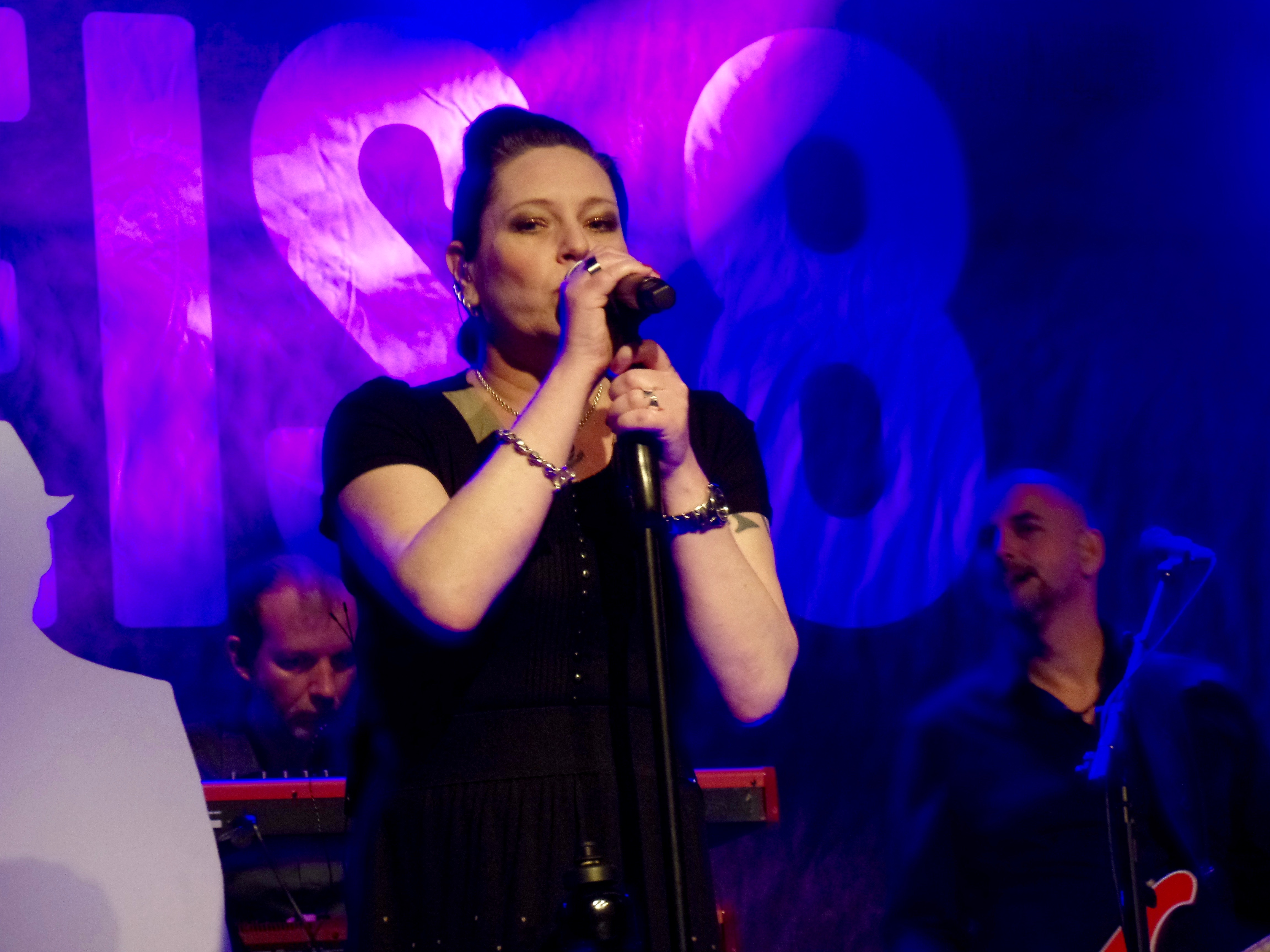 Gleis 8 während ihres Konzerts in Oldenburg